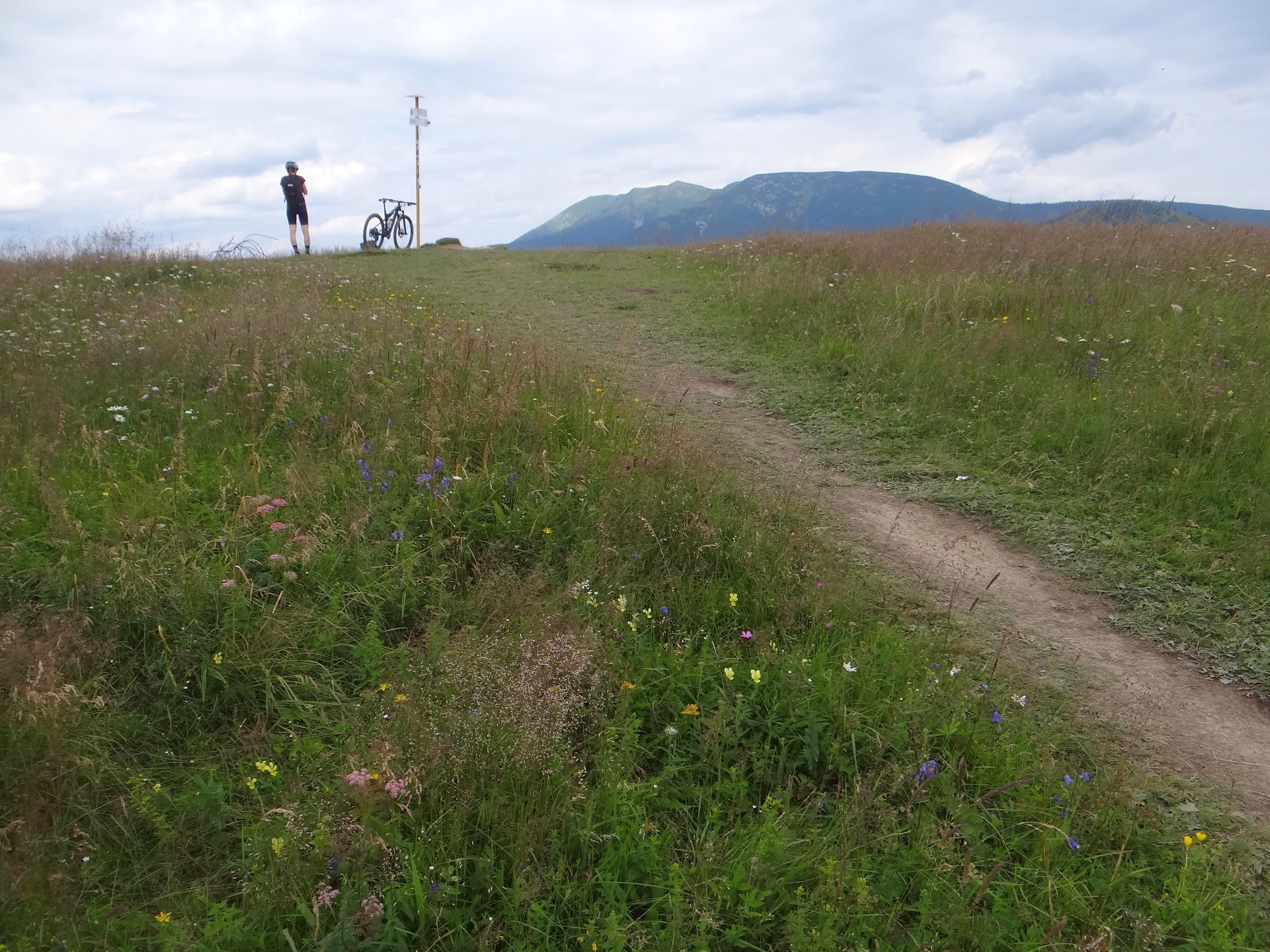 Kečka